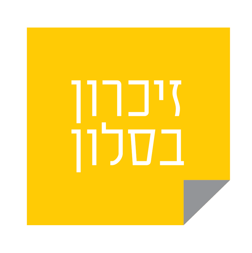 זיכרון בסלון לוגו